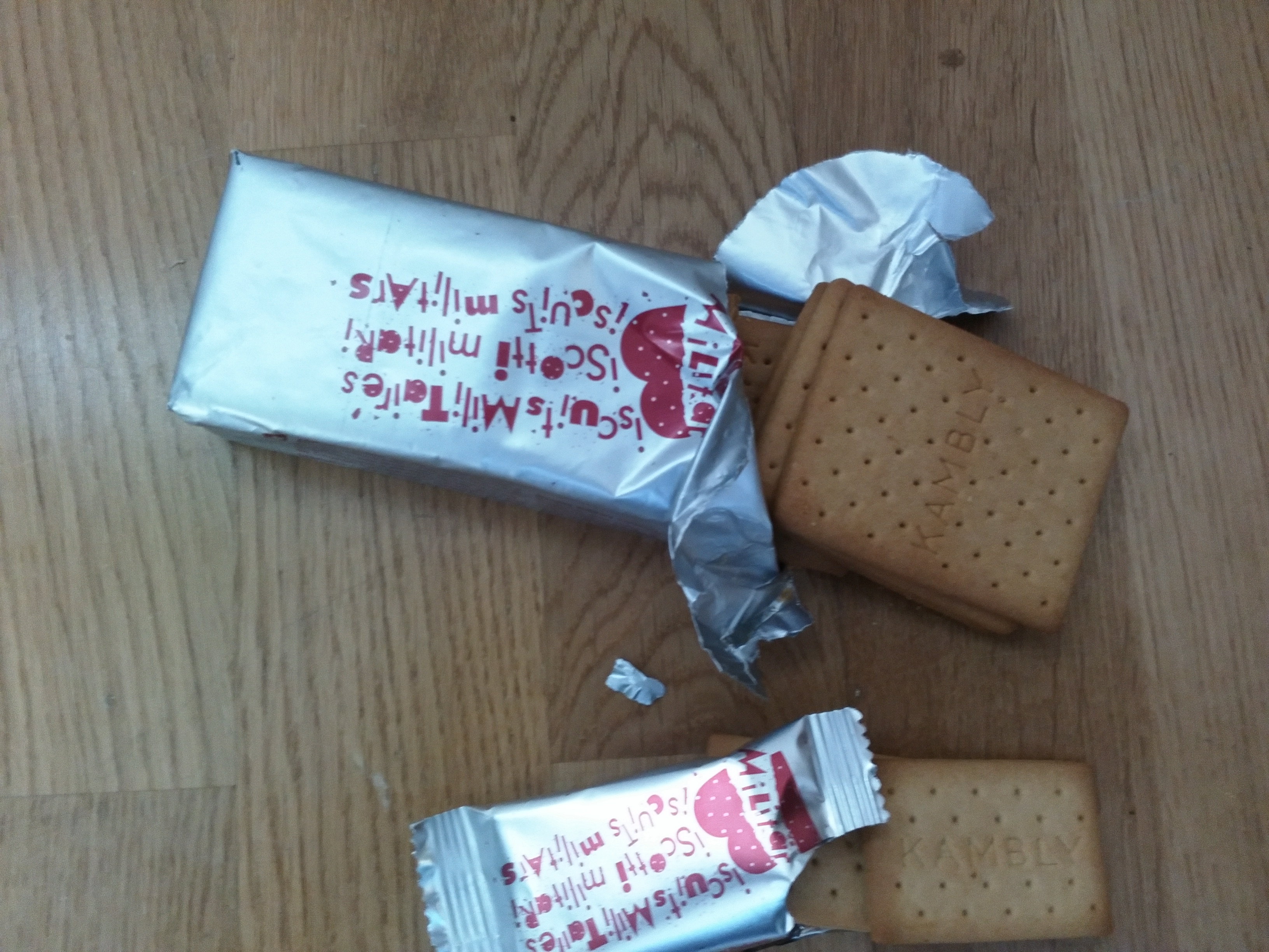 Militärbiscuit gross klein offen